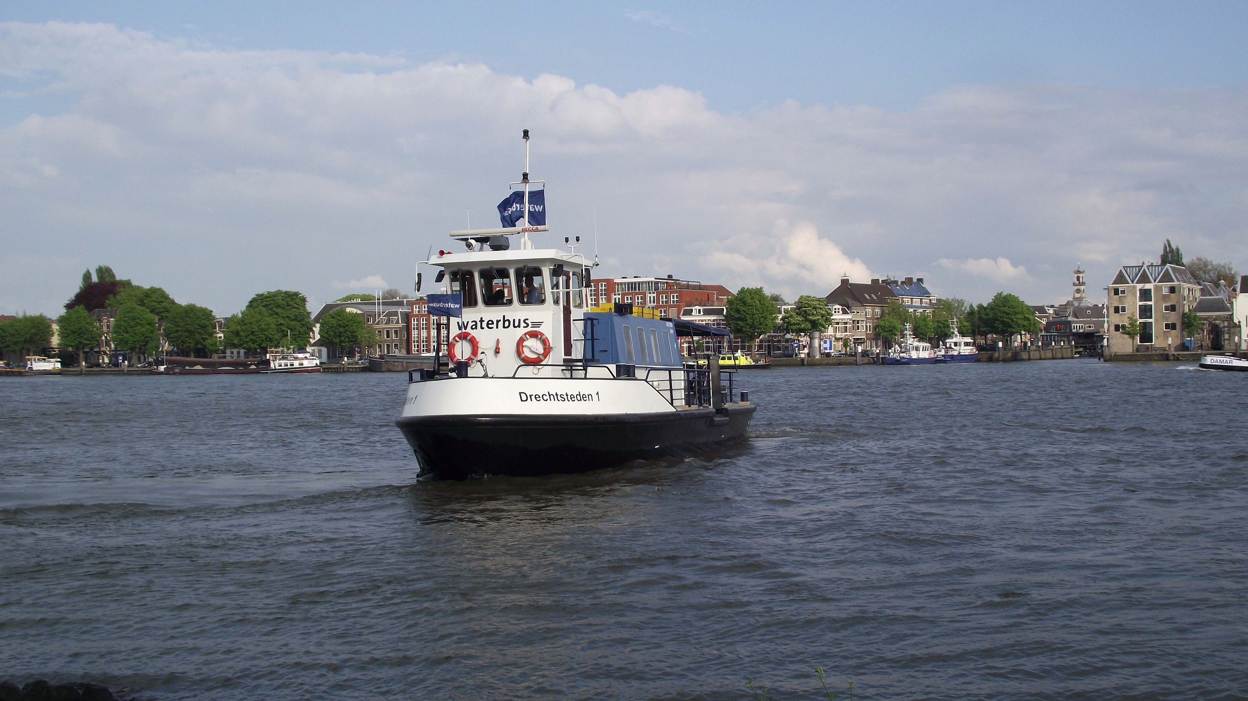 Waterbus Drechtsteden 1 op de lijn Dordrecht Hooikade - Zwijndrecht Veerplein.